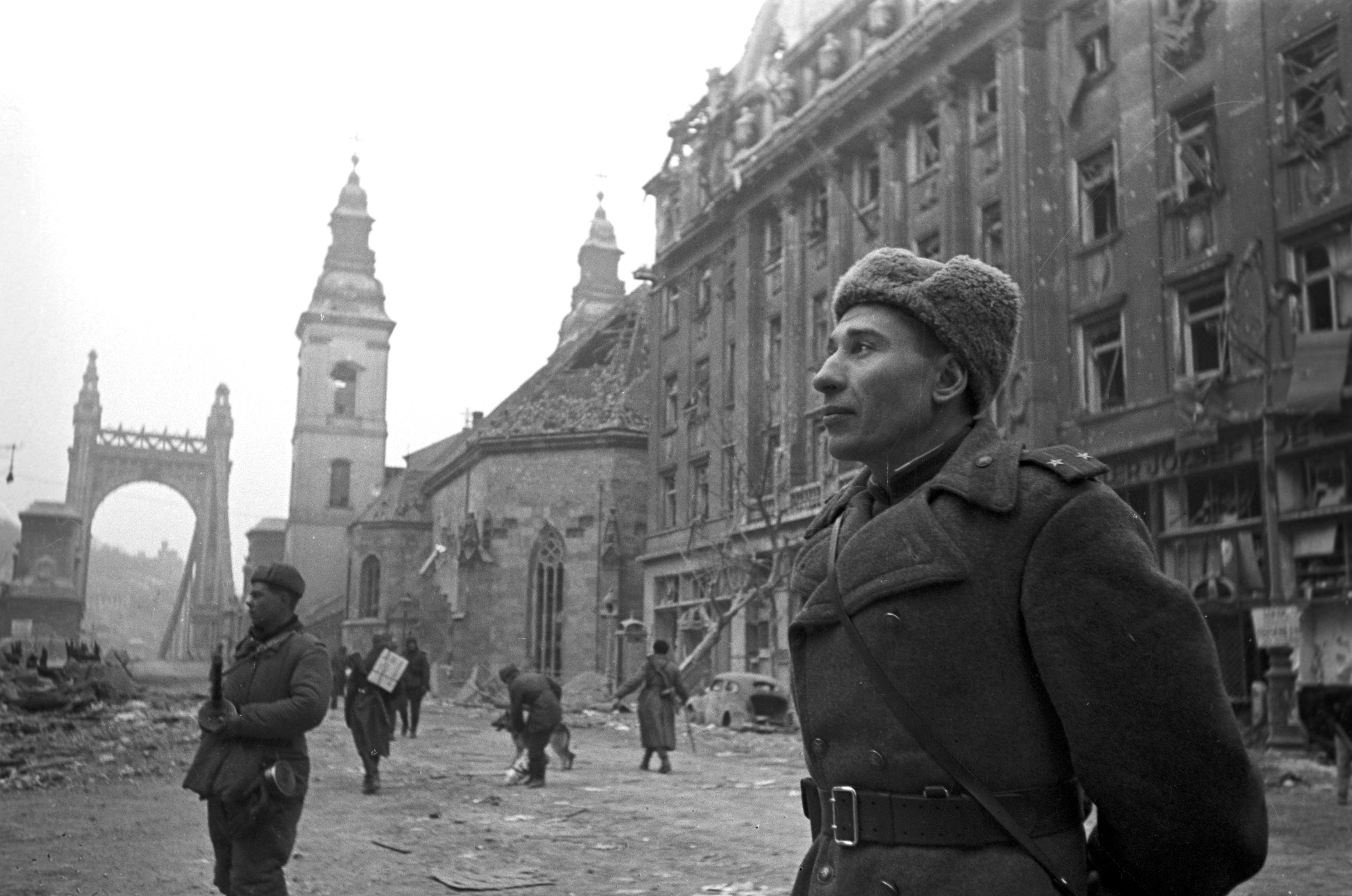 Szovjet katonák a Budapesti Apponyi téren 1945-ben. Szabad sajtó (Eskü) út az Erzsébet híd felé nézve, jobbra a Belvárosi templom és a Piarista Gimnázium.